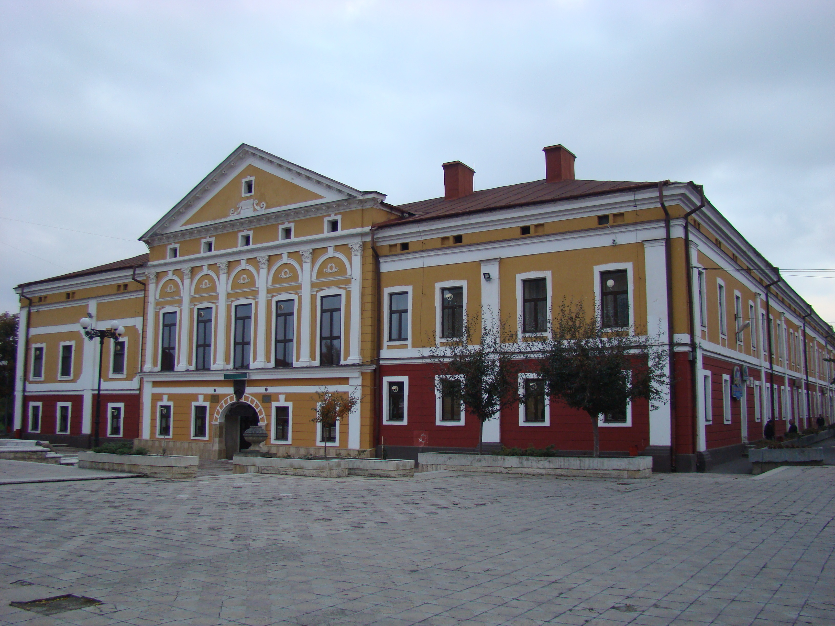 Fosta Prefectură a comitatului Maramureș, azi restaurant "Curtea Veche"